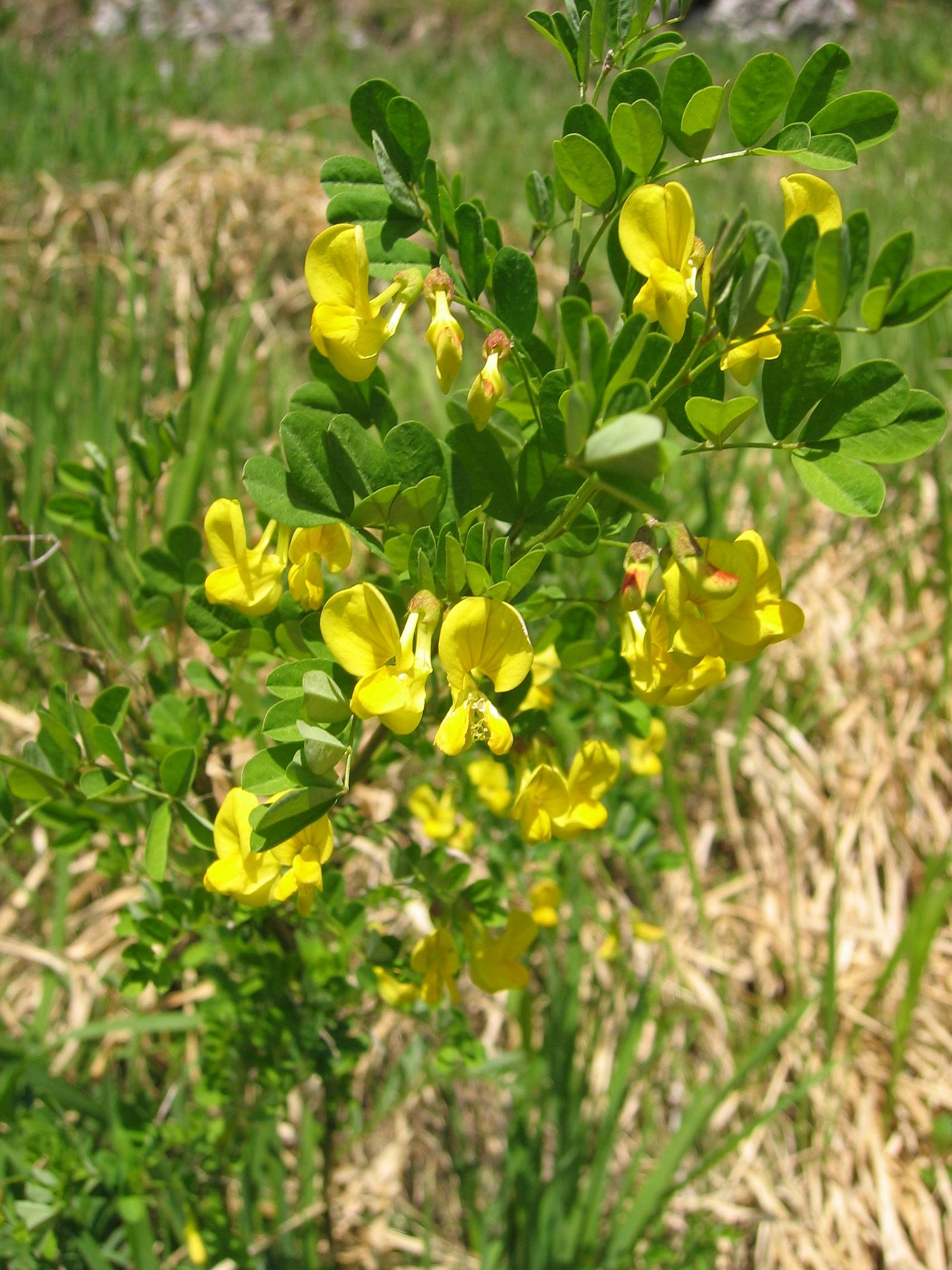 Hippocrepis emerus Kaltenbachwildnis, Upper Austria, Austria